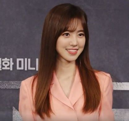 디스패치 구독 클릭! Dispatch Subscribe